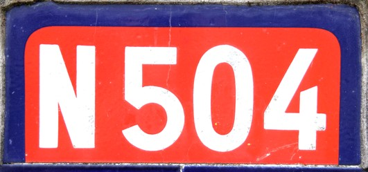 Cartouche de la route nationale 504